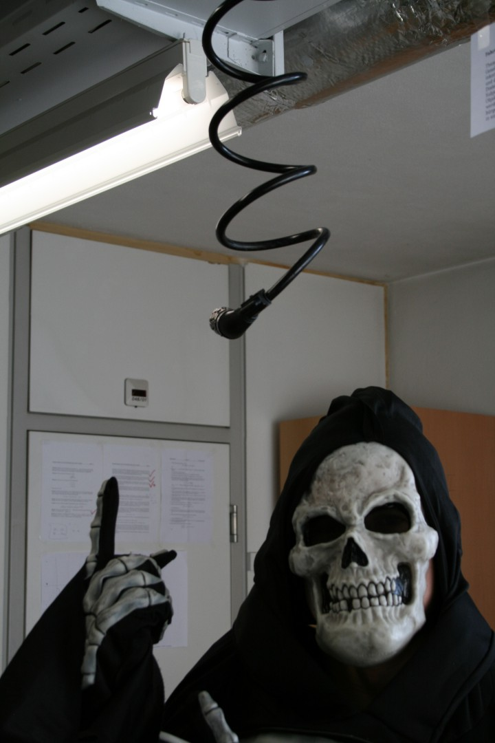 "wie der tod die bilder erklärt" von kunst/gruppe olga. aus dem aussendungstext: "am 21. todestag joseph beuys' beschmiert ein mitglied der kunst/gruppe olga seinen kopf mit fett und honig und verkleidet sich als tod. die besucher müssen die galerie verlassen, während der tod drei stunden alleine durch die ausstellung streift und bilder und objekte (eine ausstellung der jungen grazer künstlerin marlene defebre) erklärt. thematisiert wird der immanente widerspruch zwischen lebender und toter materie, also zwischen honig und fett einerseits und dem tod und leeren räumen andererseits. dadurch stellt sich natürlich auch die frage der zuordnung von kunst: ist kunst lebendig oder tot? die antwort des konservativen bildungsbürgertums ist unschwer zu erraten." Website (german): English version